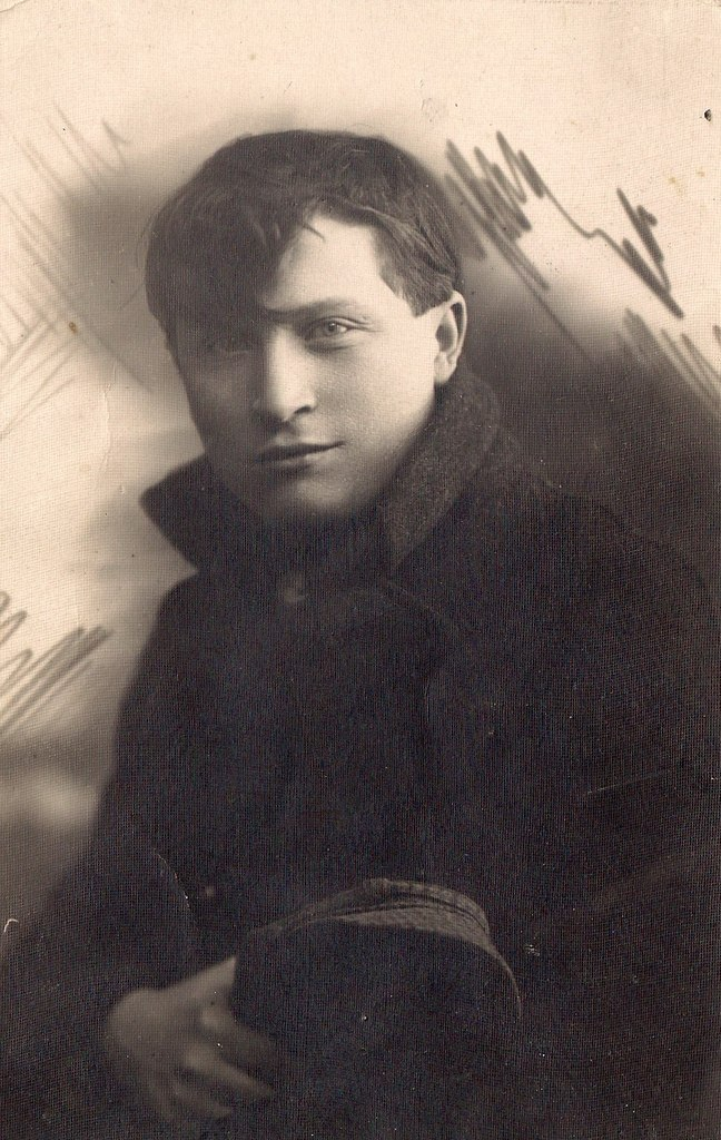 Беларуская (тарашкевіца): Беларускі паэт Язэп Пушча